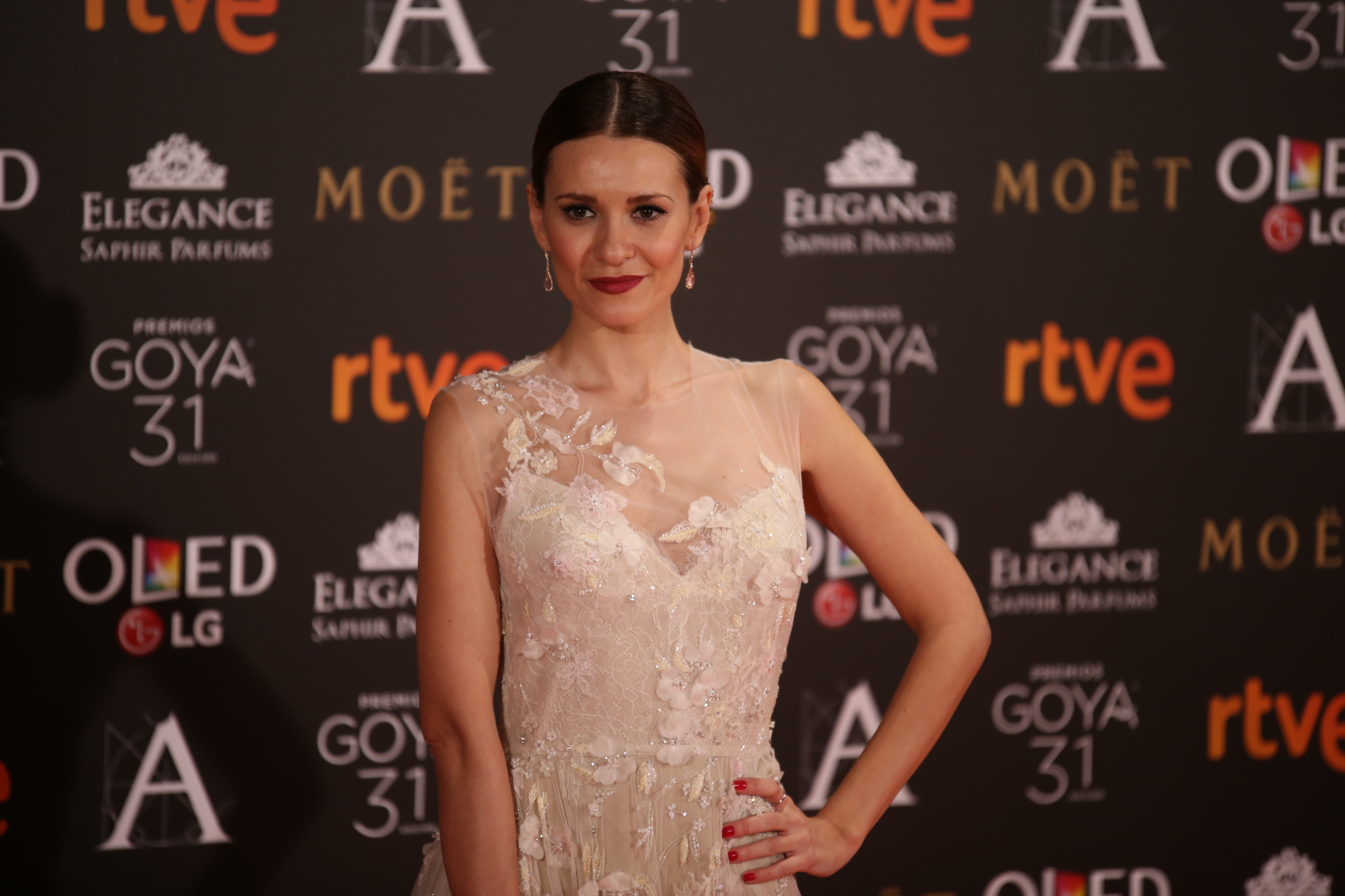 Premios Goya 2017